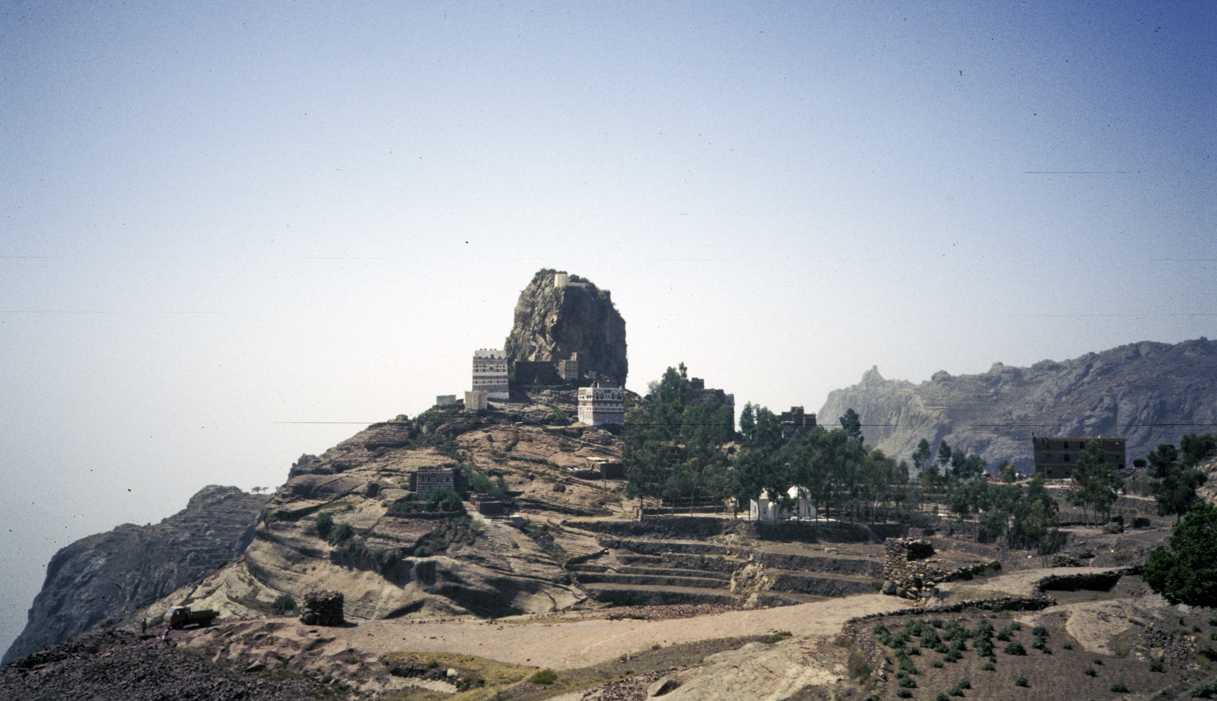 Yemen